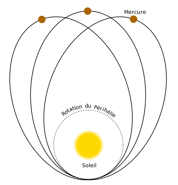 Précession de l'orbite de Mercure.